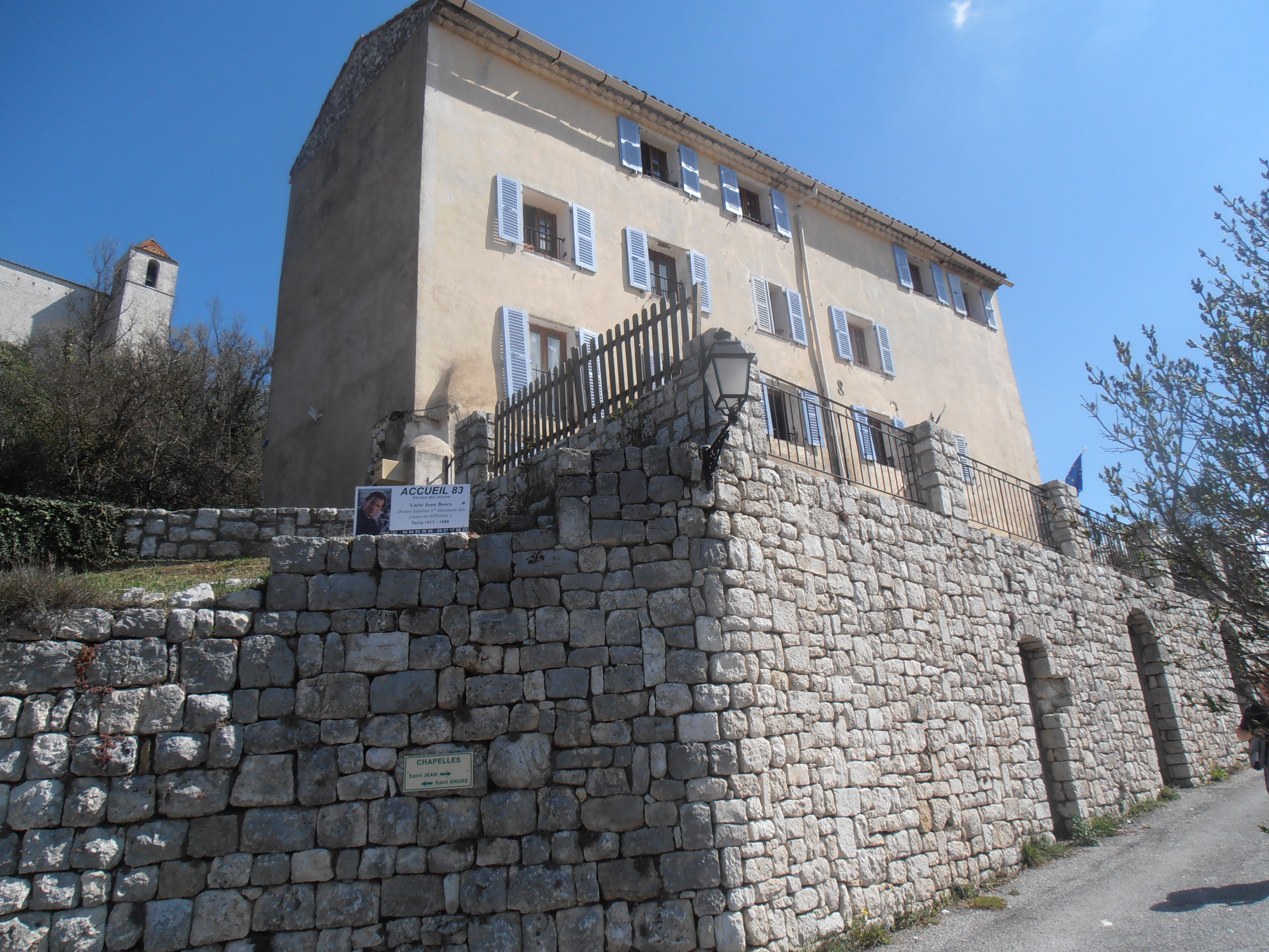 Var, Comps-sur-Artuby, Unité Jean Bosco, Accueil 83, Service des Jeunes